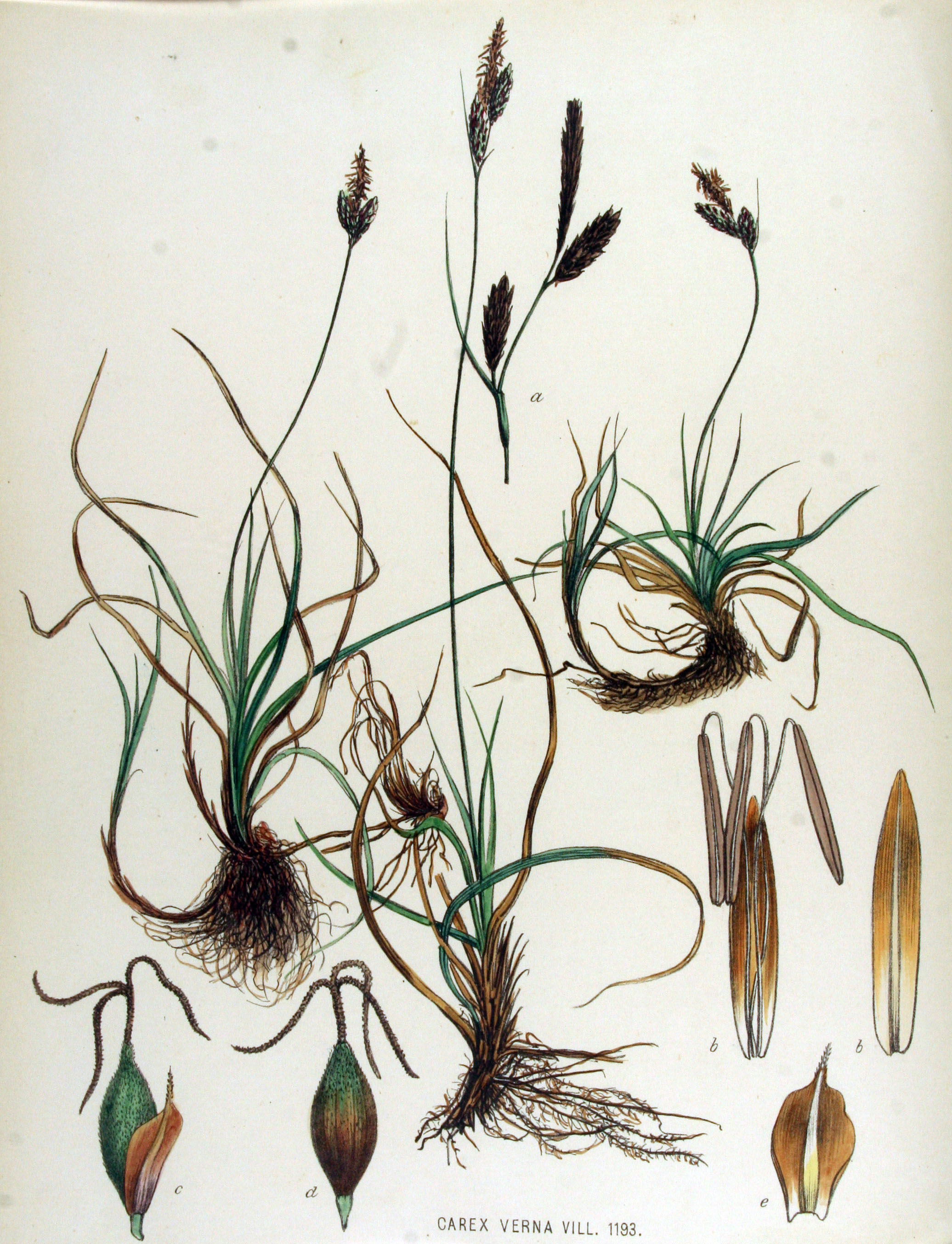 Carex caryophyllea Latourr. (Syn. Carex verna Chaix, non Lam.)